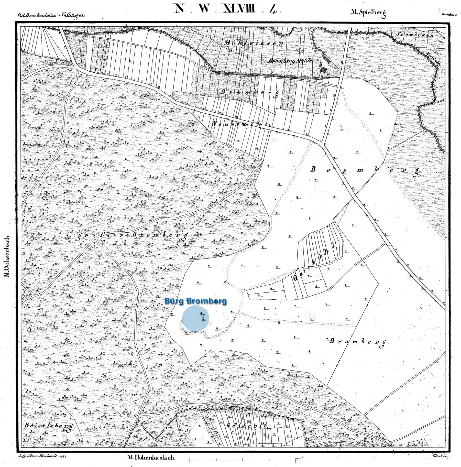 Standort der Burg Bromberg auf der genordeten Urflurkarte NW XLVIII, Blatt 4, von 1832. Heute heißt der Standort Schlössle. Außerdem zu sehen: Bromberger Mühle, Mühlgraben und Bromberger Wald. Naheliegend erscheint ein wüst gefallener Burgweiler. Quelle der Kartenvorlage: Staatsarchiv Ludwigsburg, EL 68 VI, Nr. 8848